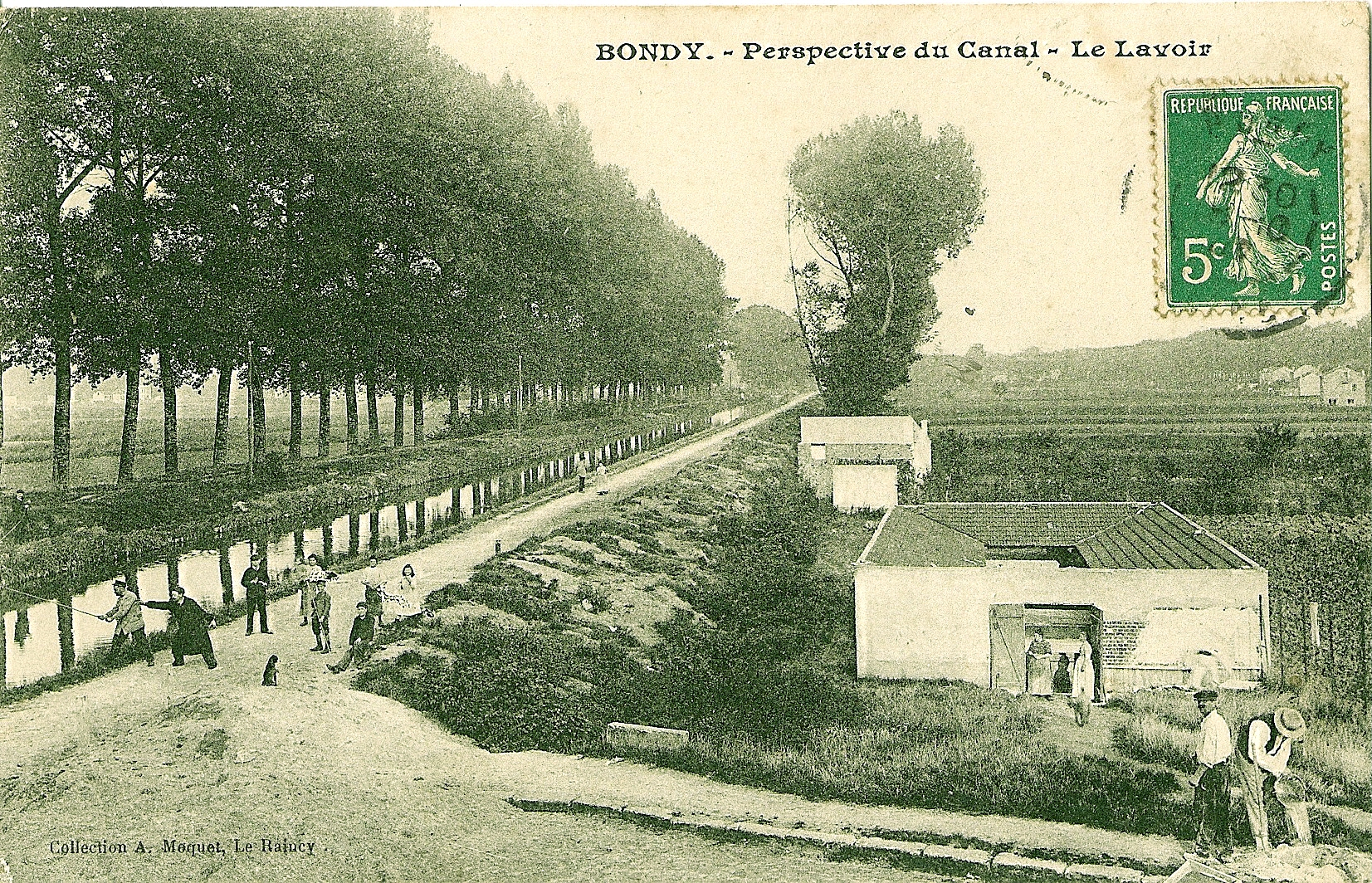 Carte postale ancienne éditée par Moquet au raincyBONDY : Perspective du Canal - Le Lavoir